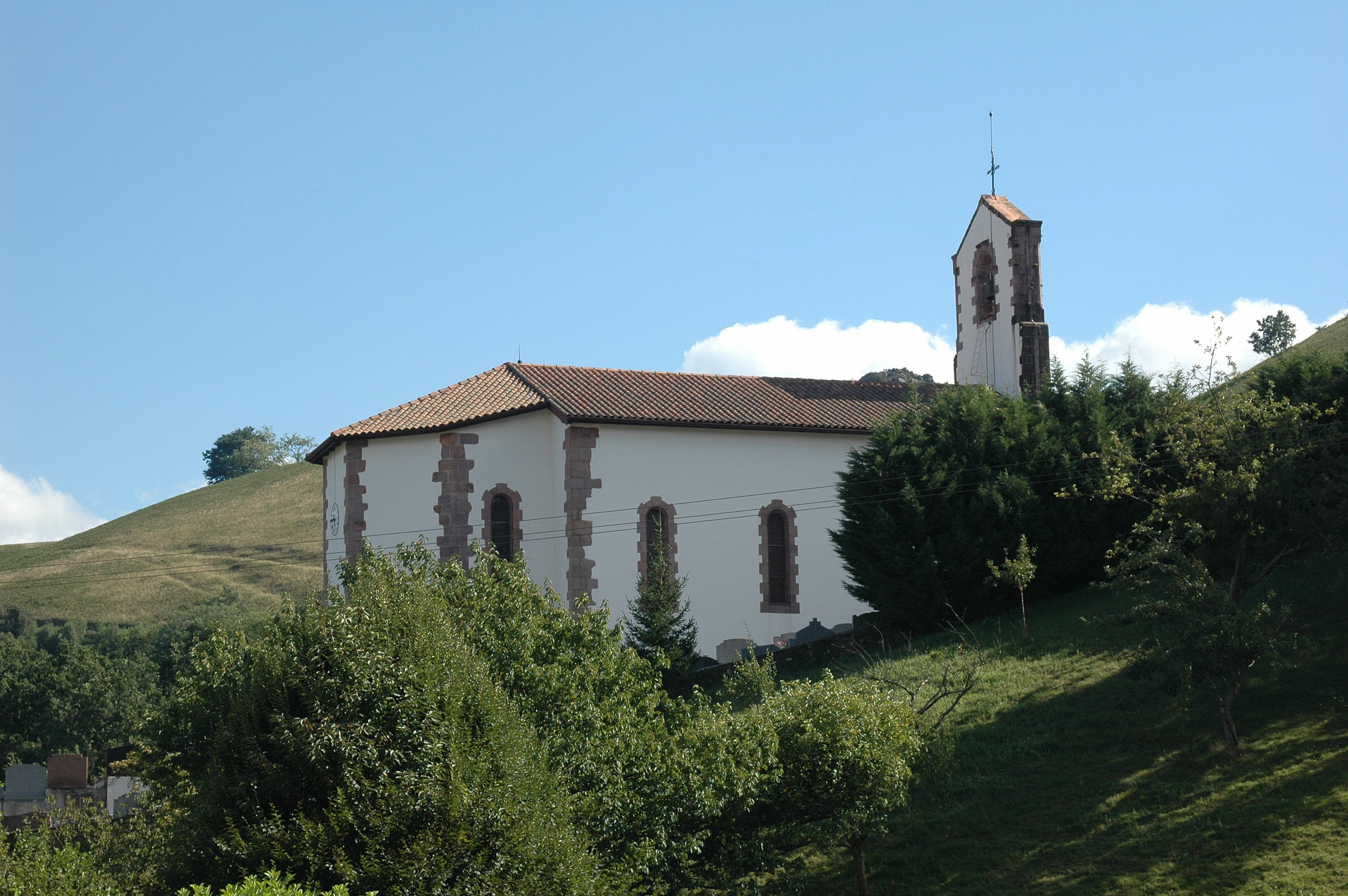 Saint-Martin d'Arrossa, l'église Saint Martin. Photo prise le 03/08/06 par Harrieta171